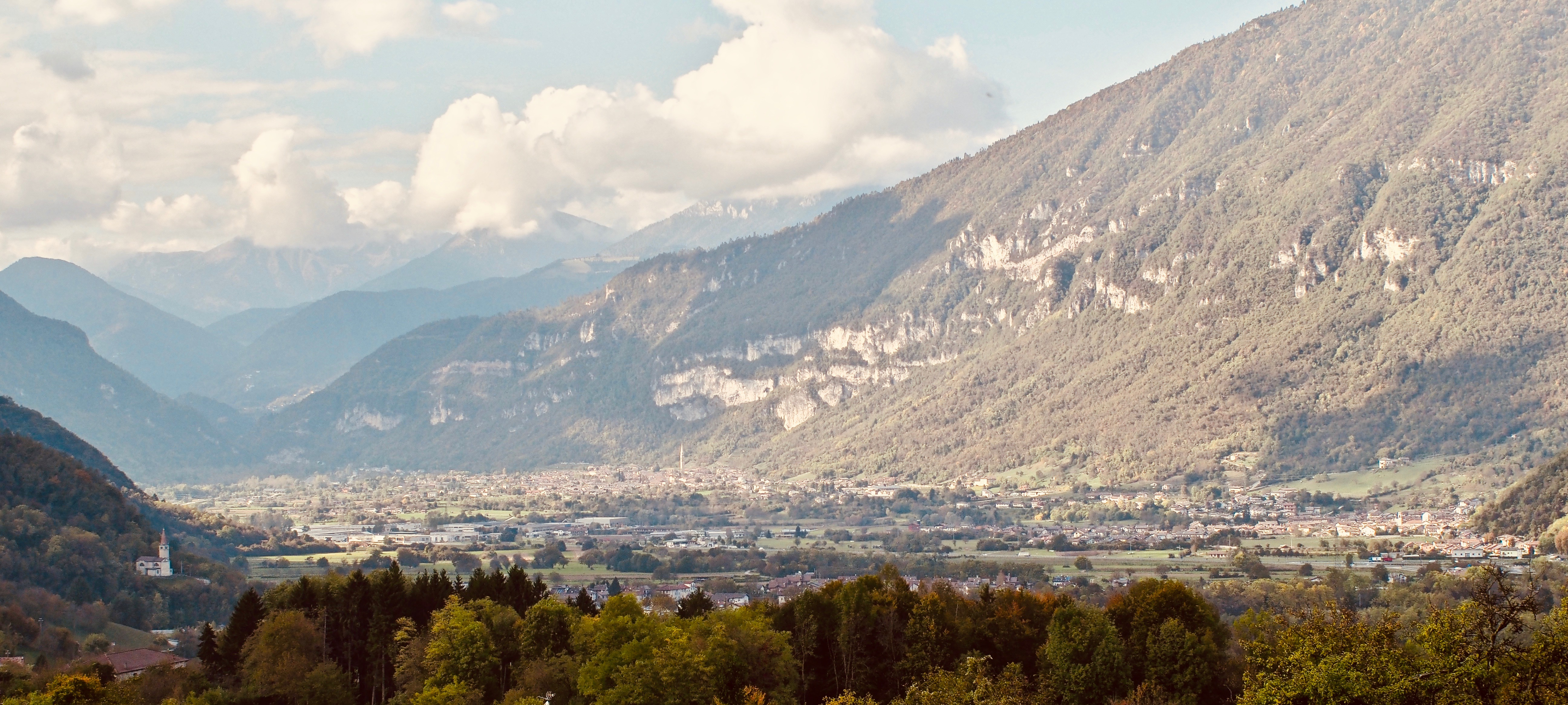 Fonzaso, fotografato da Seren del Grappa